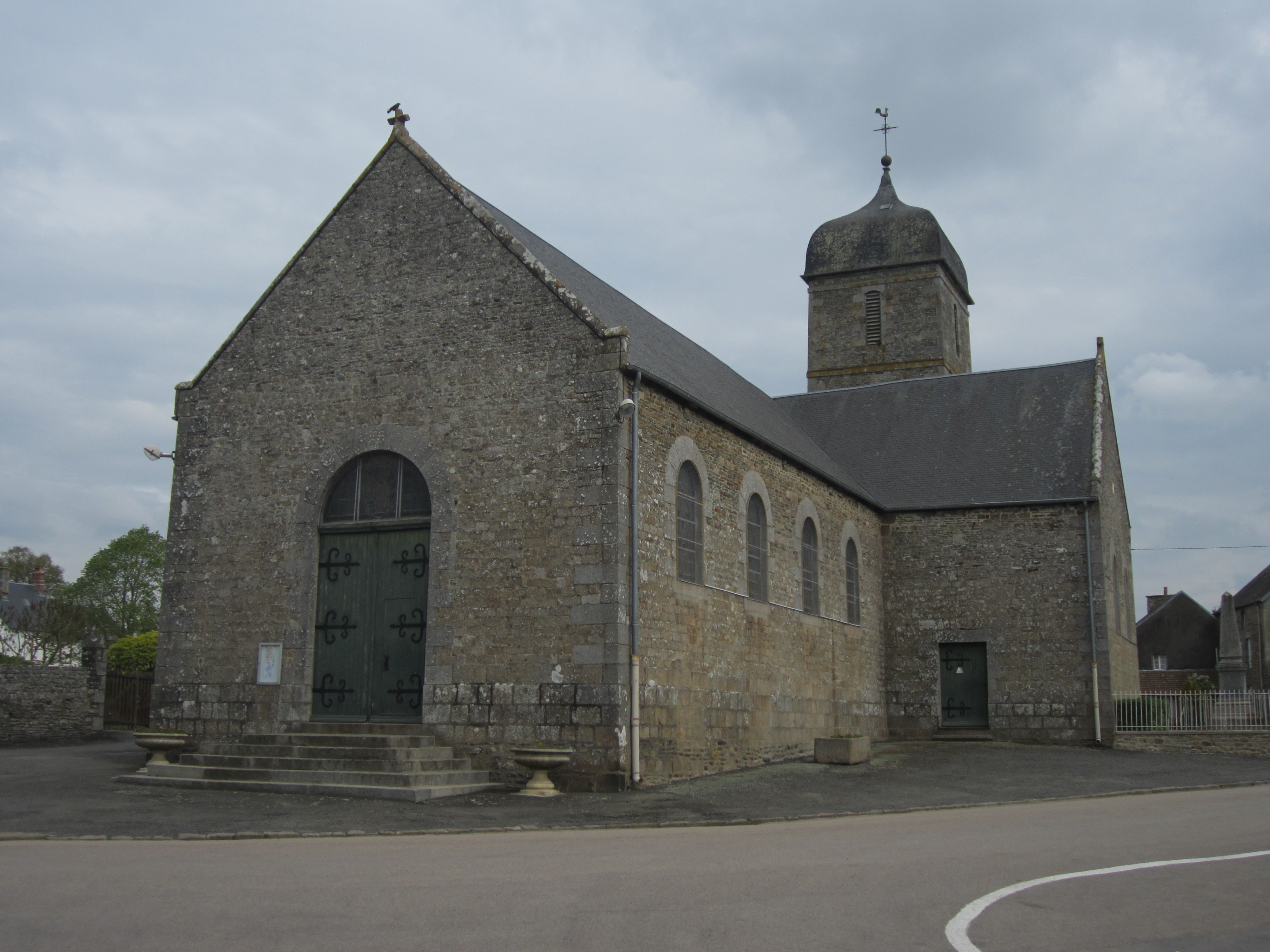 Bacilly, Manche